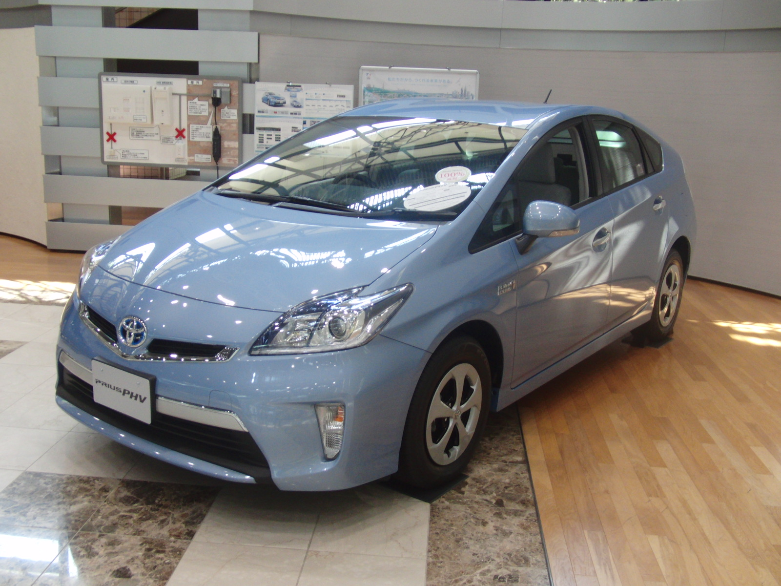 トヨタ・プリウスPHVを撮影